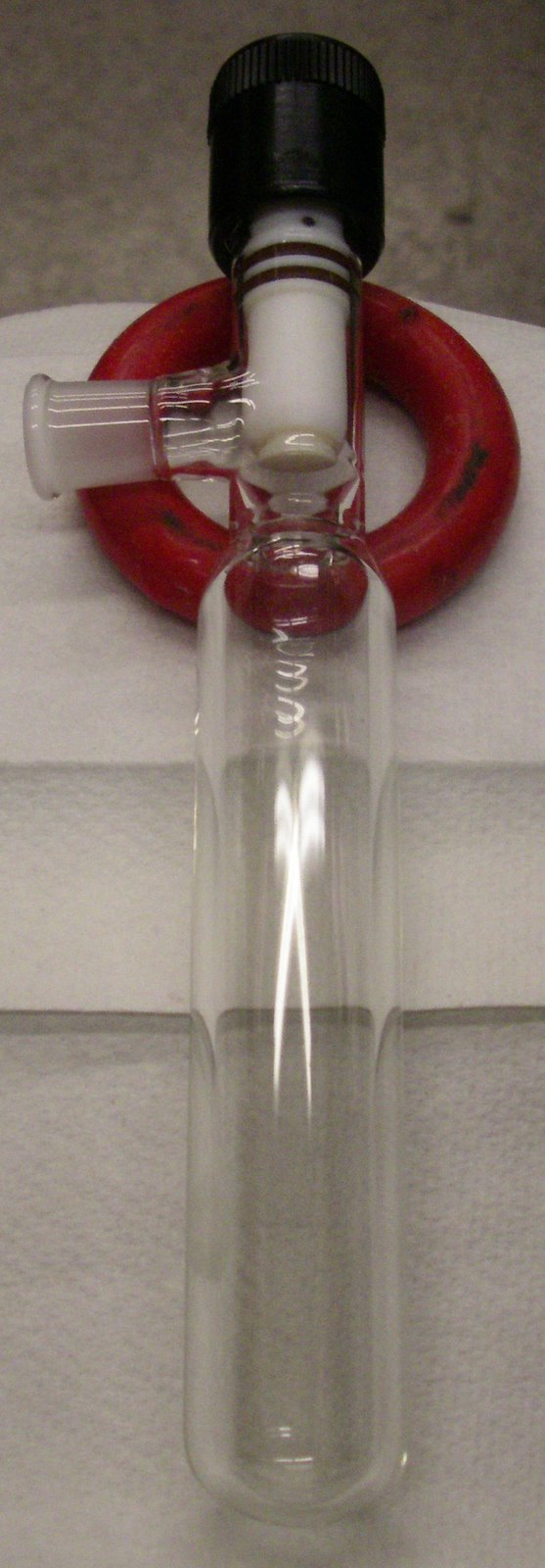 Schlenk bomb